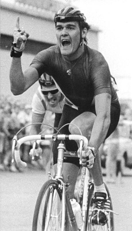 Carsten Wolf ADN-ZB Hiekel 11.8.88-B-Dresden: 4. Sachsen-Tour - Die 3. Etappe entschied Carsten Wolf (SC Dynamo Berlin) für sich. Der Zweite der diesjährigen Holland-Rundfaht war Spurtschnellster auf einem Rundkurs (60 km) in Dresden-Prohlis., Seine Zeit: 1:16,25 h. Hinter ihm Frank Kühn (TSC Berlin), der Platz 2 belegte.